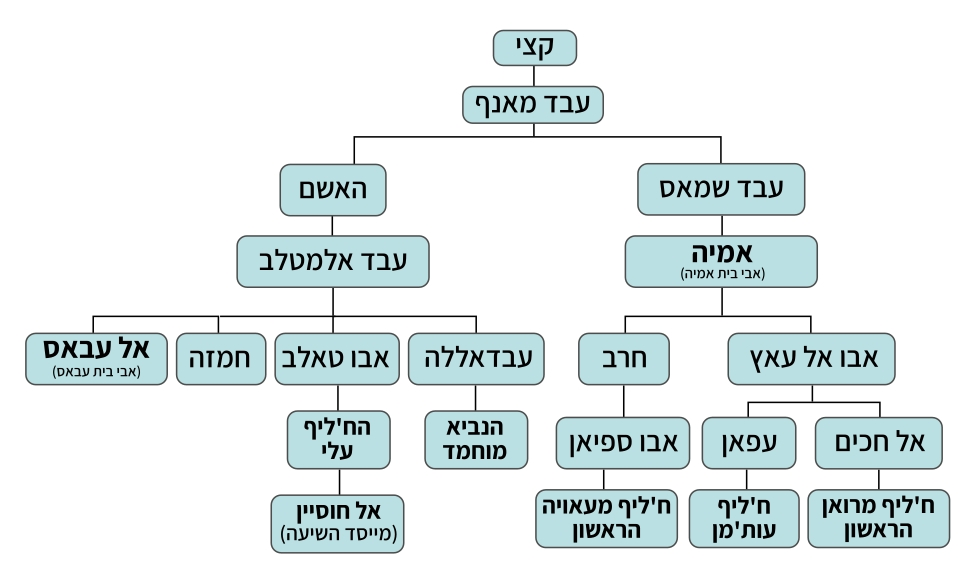 שושלת היוחסין של הנביא מחמד וקשריו עם הח'ליפים הבאים